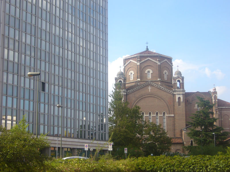 Foto di via Gozzi, centro Direzionale. Foto scattata nel 2006, autore C.N.